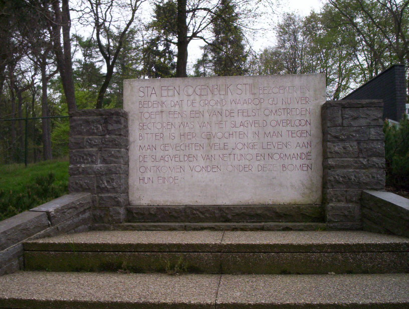 Gedenksteen op het slagveld Overloon